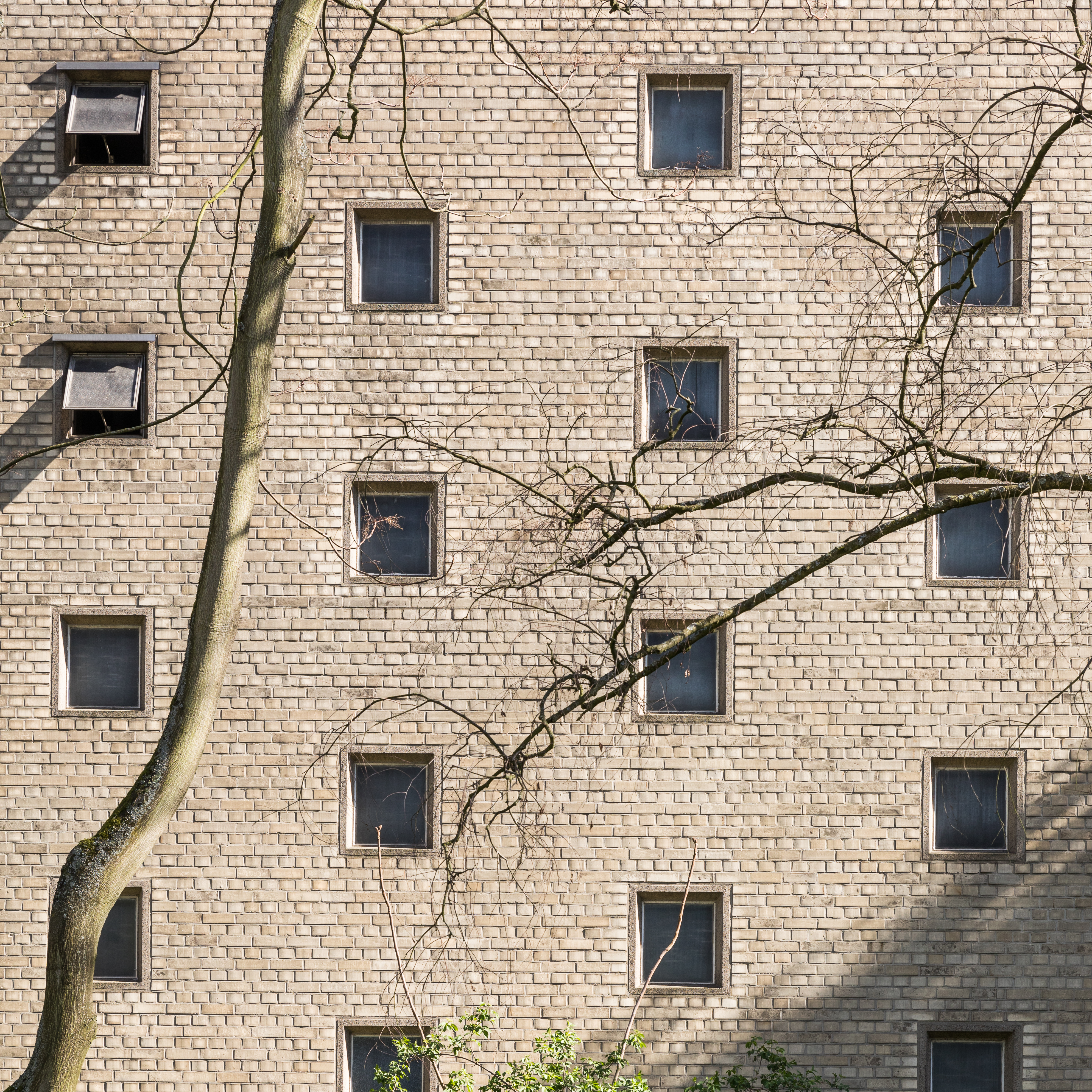 St. Hildegard in der Au, Köln-Nippes. Detail: Fenster in der nordwestlichen Außenwand